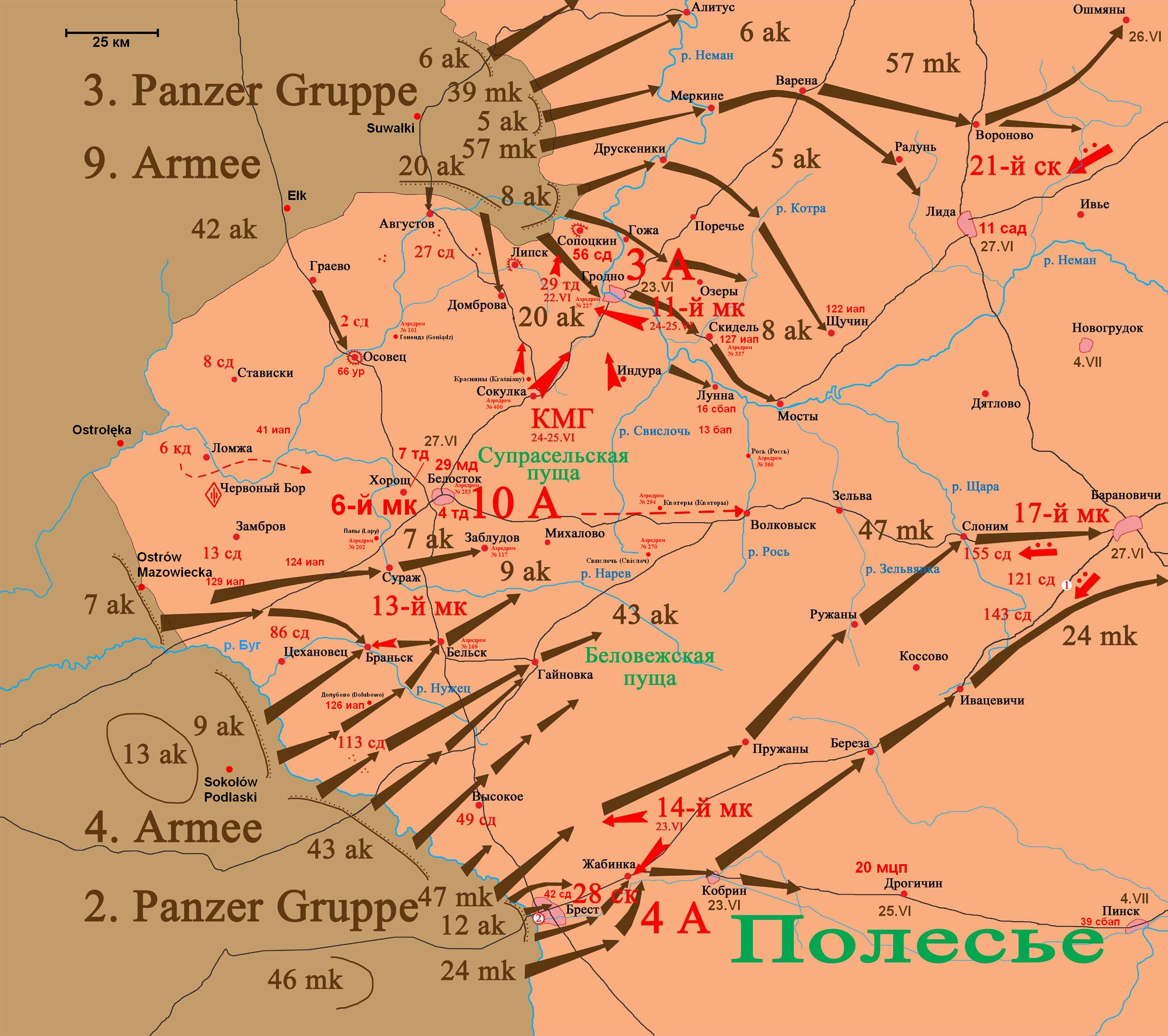 Подписи к рисунку 1. Обуз-Лесьна – Полевое управление штаба Западного фронта. 2. Оборона Брестской крепости (22-30.VI.1941). Отдельные защитники продолжали сопротивление до 20.VII.1941.